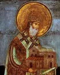 Макарије Соколовић, архиепископ пећки и српски патријарх 1557-1574